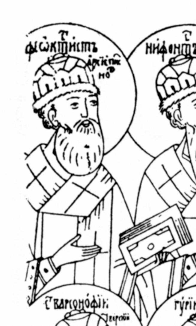 Феоктист Новгородский. Икона "Русские святые" (фрагмент). Рисунок (перевод с иконы). Россия. 1814 год. Лист 5. Музей СпбДА, табл. 60